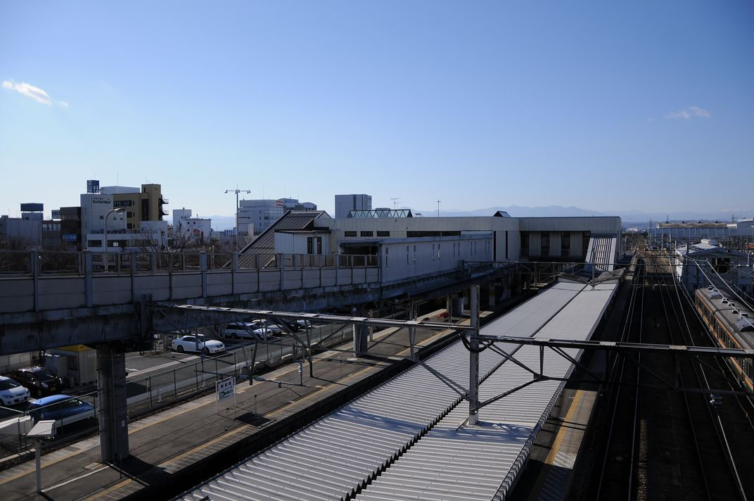 新前橋駅東西通路。新前橋駅西口へ跨線橋から撮影。